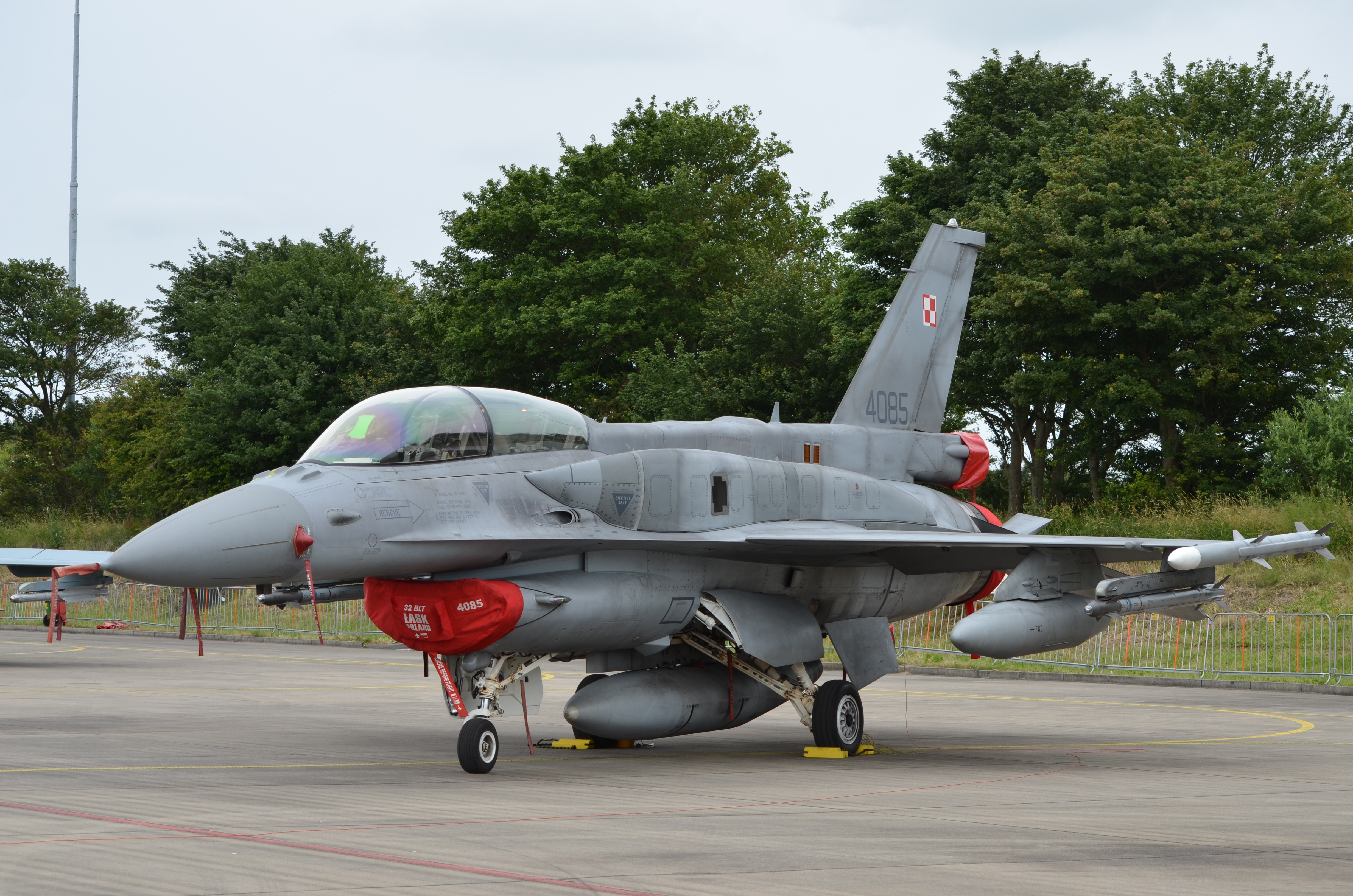 Een F-16 op de open dag van de Luchtmacht in Leeuwarden, 2016.